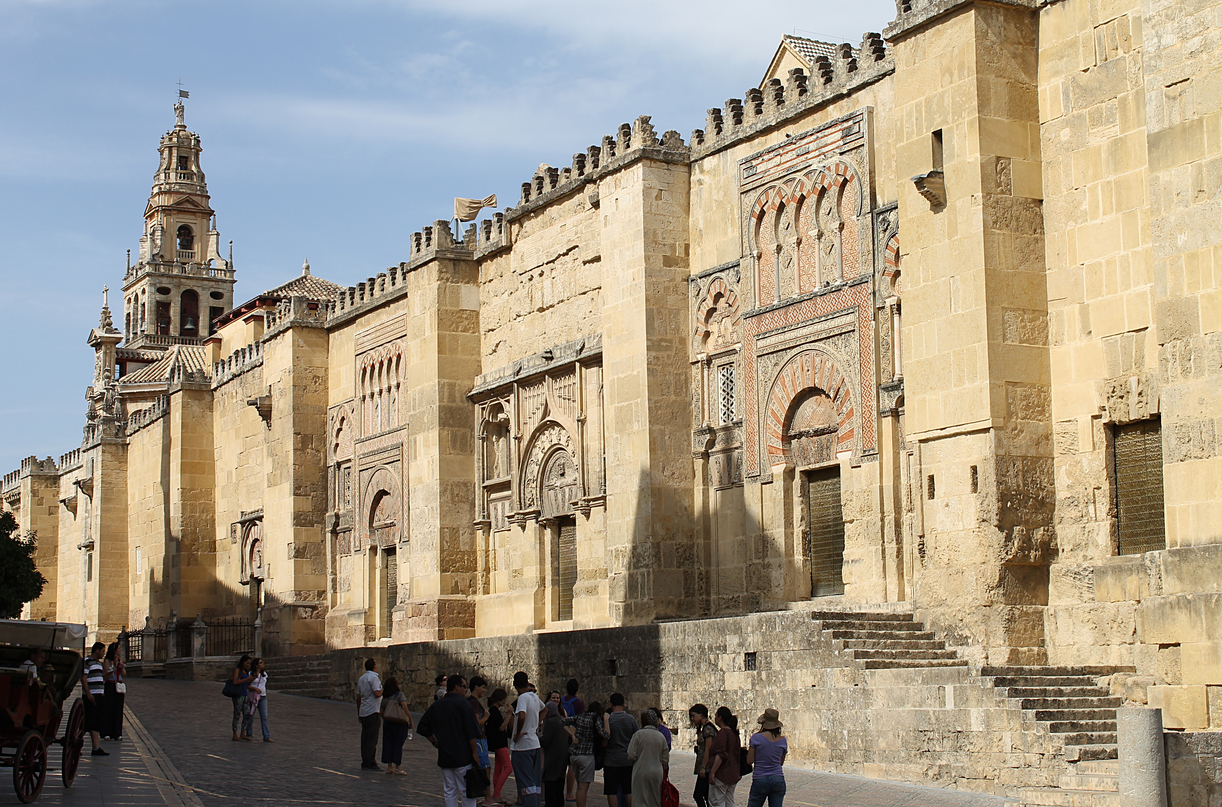 Extérieur de la Mezquita. Il faut faire le tour de la mosquée pour admirer la décoration élégante des portes, dont la plupart sont condamnées.